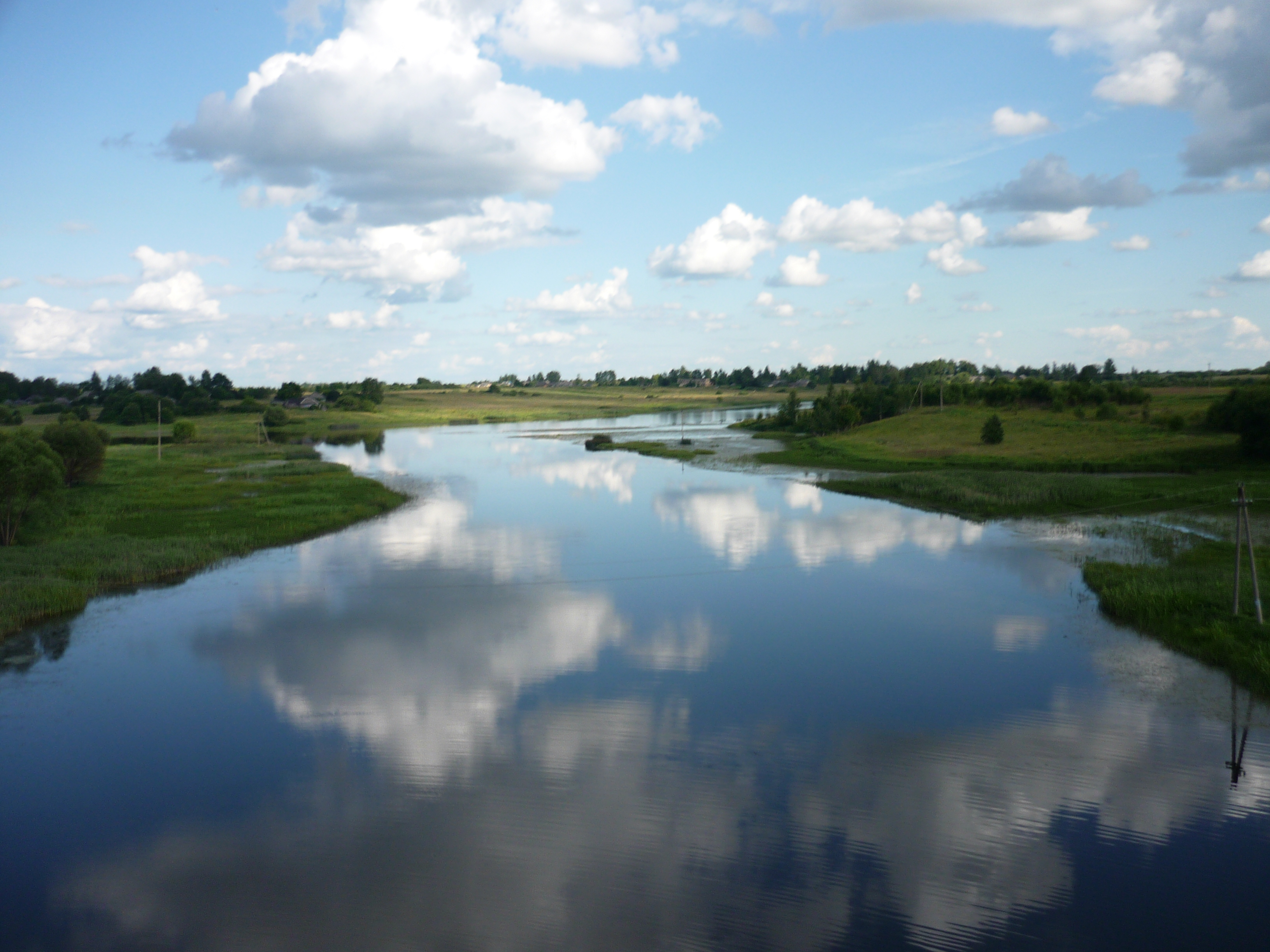 Устье реки Лосьмины